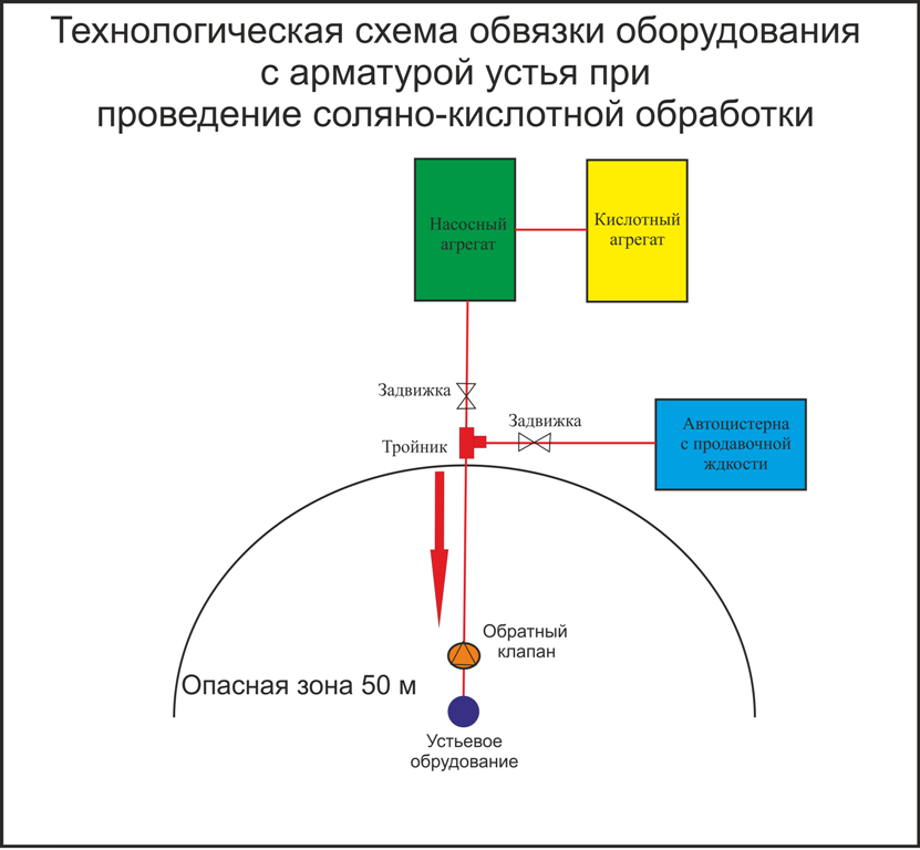 Проведение соляно-кислотной обратоки в нефятных скважинах